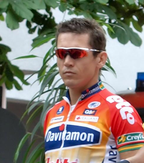 Robbie McEwen at Sparkassen Giro Bochum